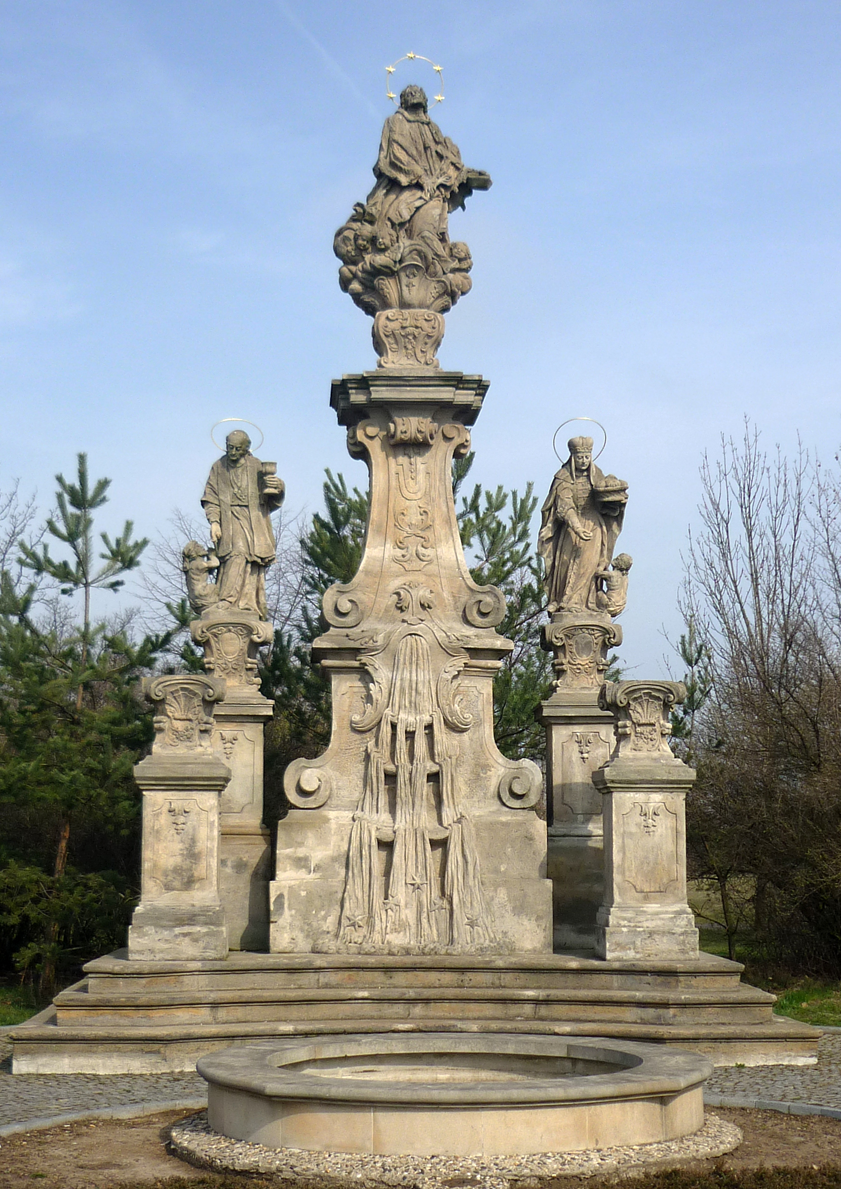 Barocke Skulpturengruppe des hl. Johannes von Nepomuk mit den Statuen des hl. Karl Borromäus und der hl. Elisabeth an der Kirche Mariä Himmelfahrt in Most